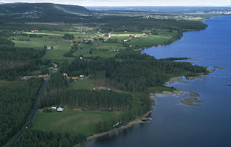 Motiv: Hovermo Nyckelord: Flygbilder, Riksintressen Kategori: Miljöer, Odlingslandskap Hovermo